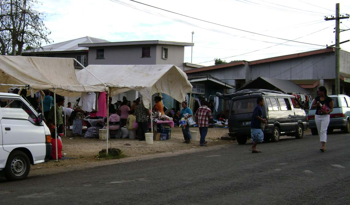 Saturday market in Neiafu, Vavaʻu, Tonga